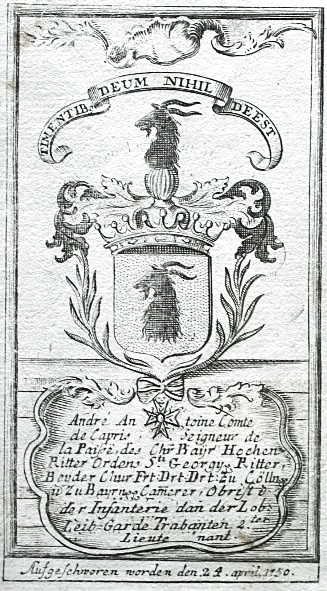 Wappen des Generalleutnants Andreas Anton von Capris (116-1776)